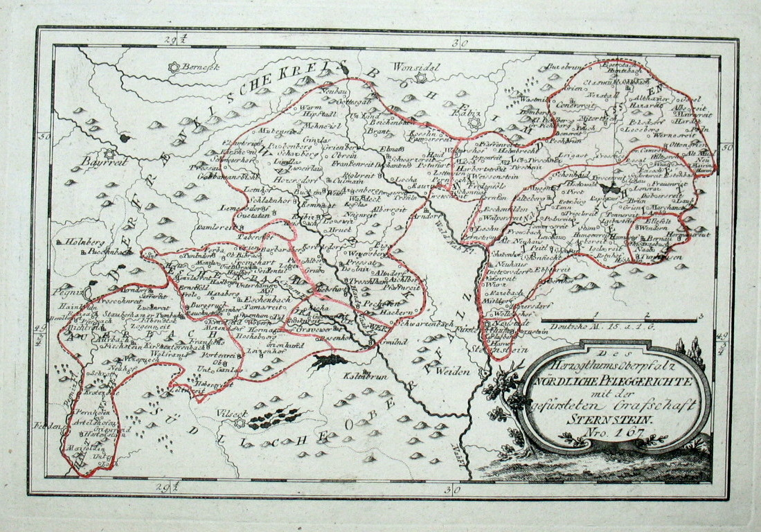 Des Herzogthums Oberpfalz nördliche Pfleggerichte mit der gefürsteten Grafschaft Sternstein. Nro. 167. Kolorierter Kupferstich